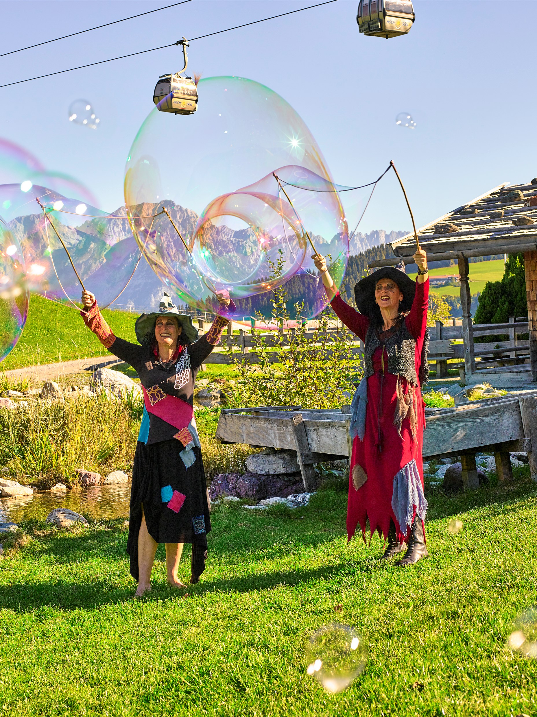 Die Hexenwasser Hexen machen Riesenseifenblasen